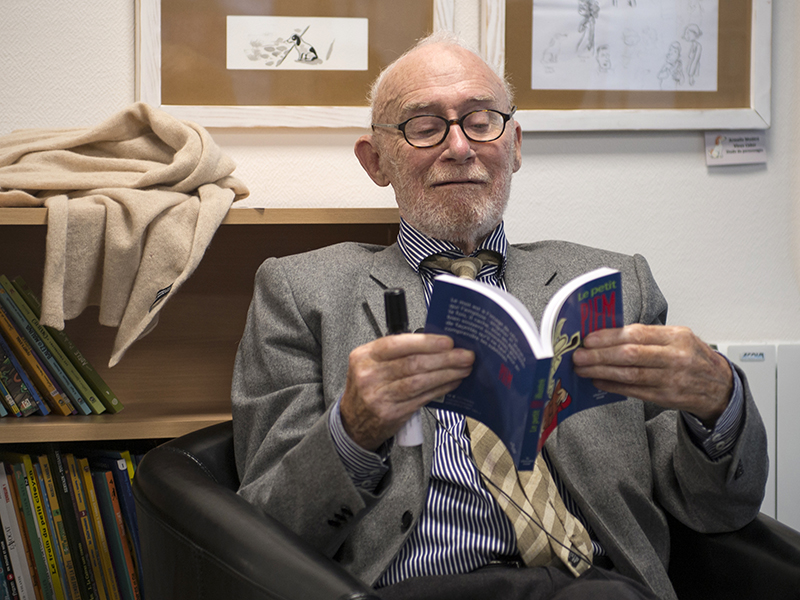 Le dessinateur d'humour Piem, au festival bd BOUM à Blois, le 20 novembre 2016.